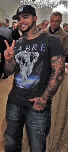 Тимати